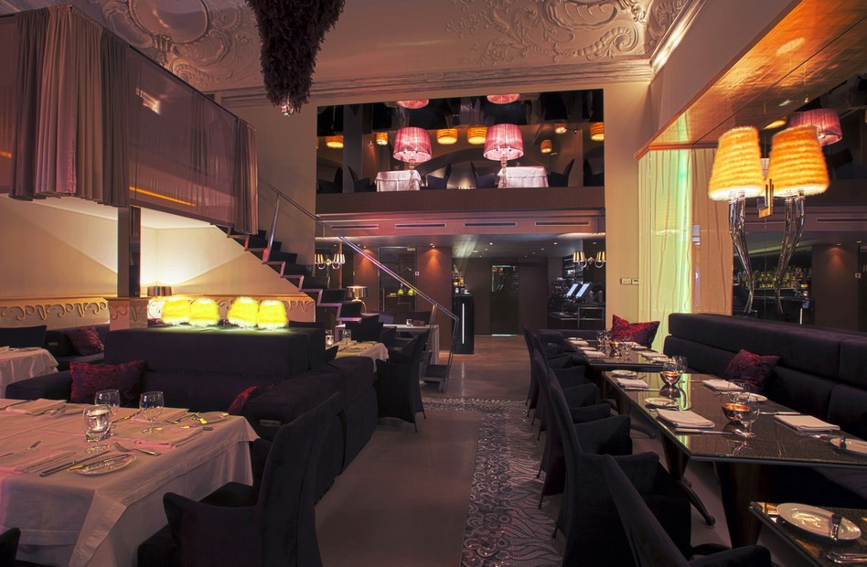 A budapesti Cyrano étteremből egy részlet (Redform Design Studio – Veres Péter)